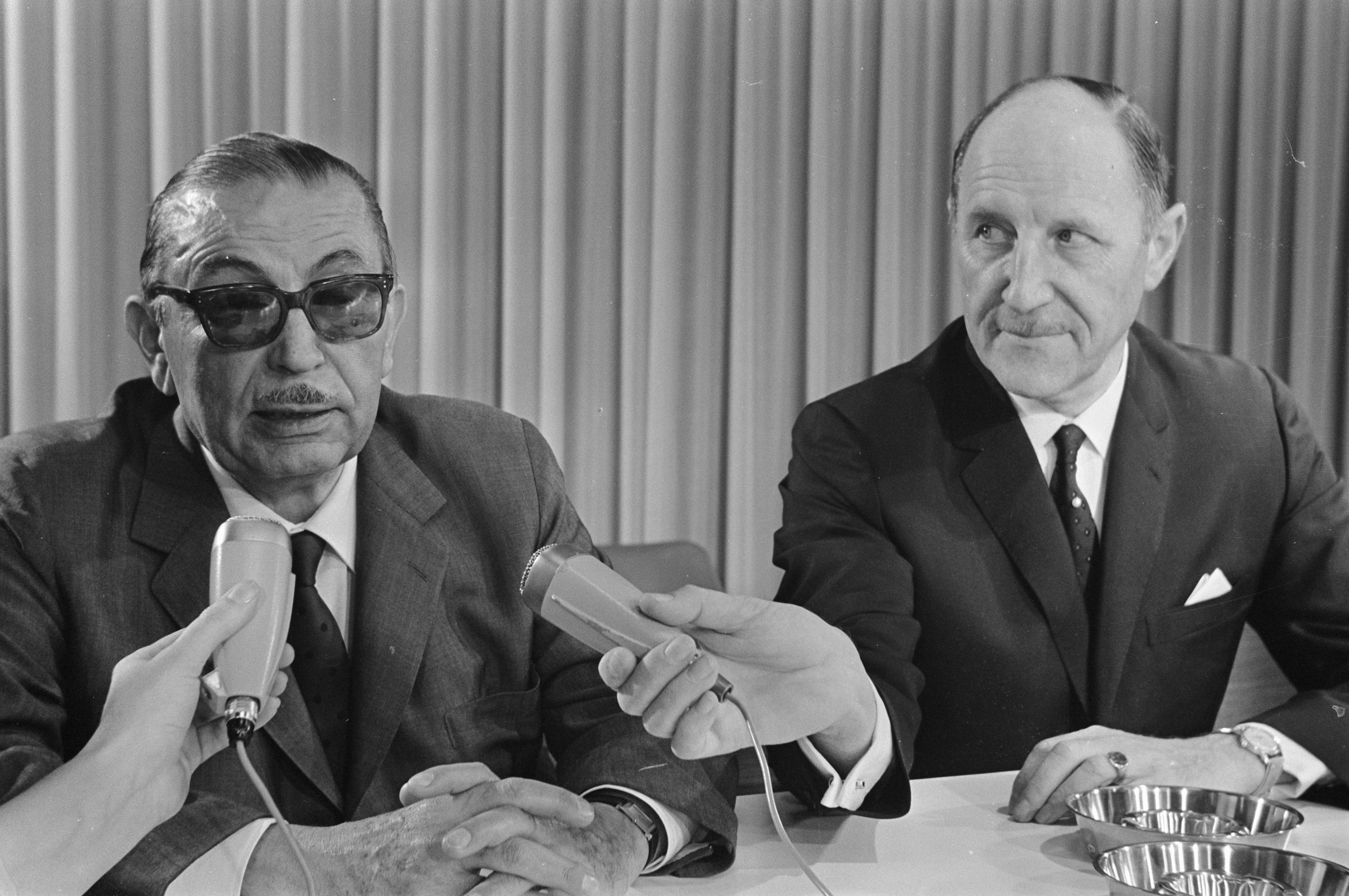 Collectie / Archief : Fotocollectie Anefo Reportage / Serie : [ onbekend ] Beschrijving : Aankomst Turkse minister van Buitenlandse Zaken Ihsan Sabri Caglayangil op Schiphol, rechts minister Luns Datum : 15 juli 1968 Locatie : Noord-Holland, Schiphol Trefwoorden : aankomsten, ministers Persoonsnaam : Caglayangil Sabri, Luns, J.A.M.H., Luns, Joseph Fotograaf : Evers, Joost / Anefo Auteursrechthebbende : Nationaal Archief Materiaalsoort : Negatief (zwart/wit) Nummer archiefinventaris : bekijk toegang 2.24.01.05 Bestanddeelnummer : 921-5123